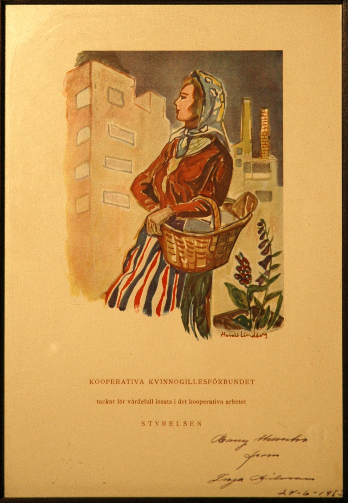 Priznanje mednarodne Zadružne zveze Mari Rupena (Kooperativa kvinnogilesförbundet)